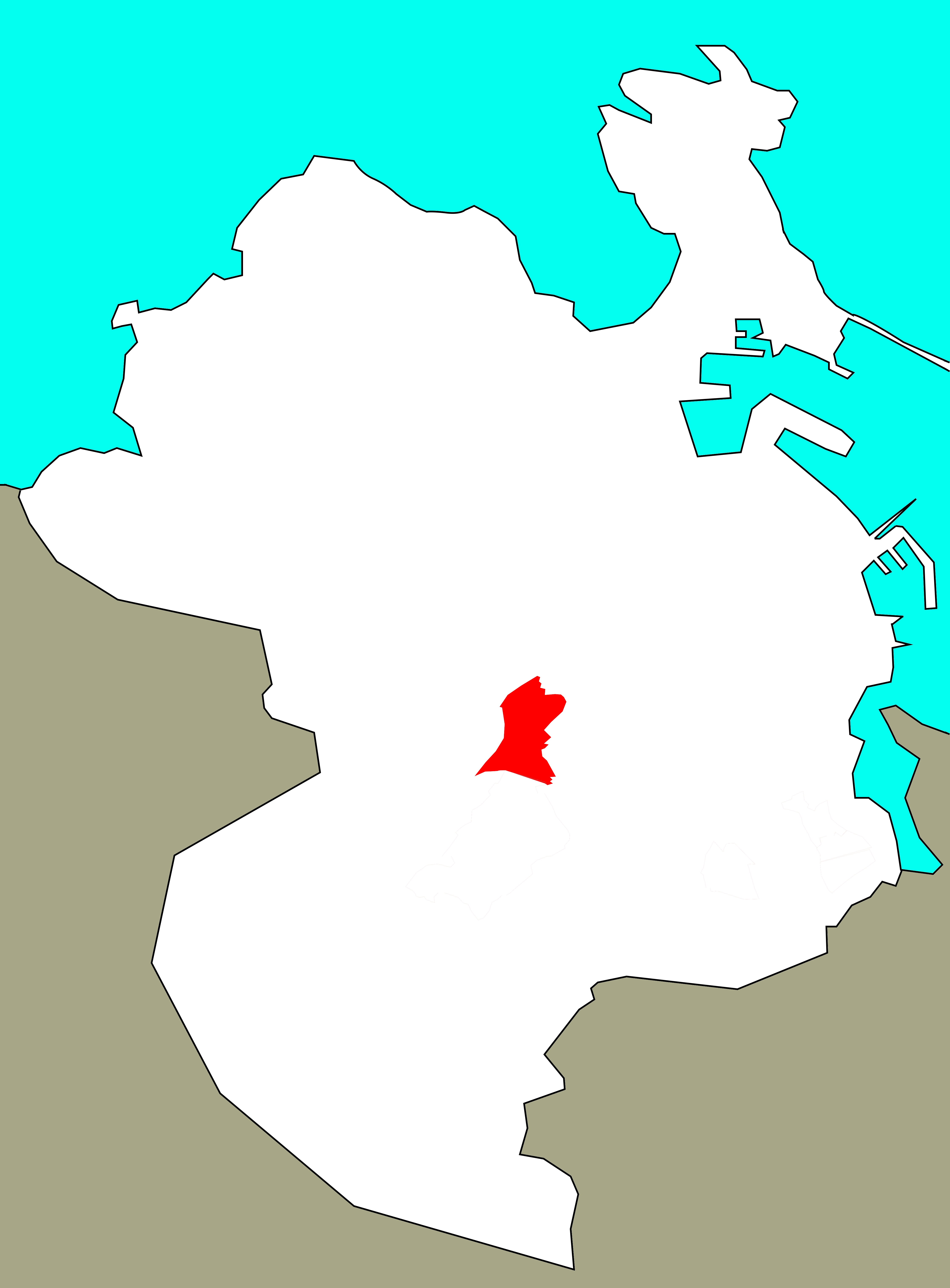 Situación do Martinete no concello da Coruña.[1]